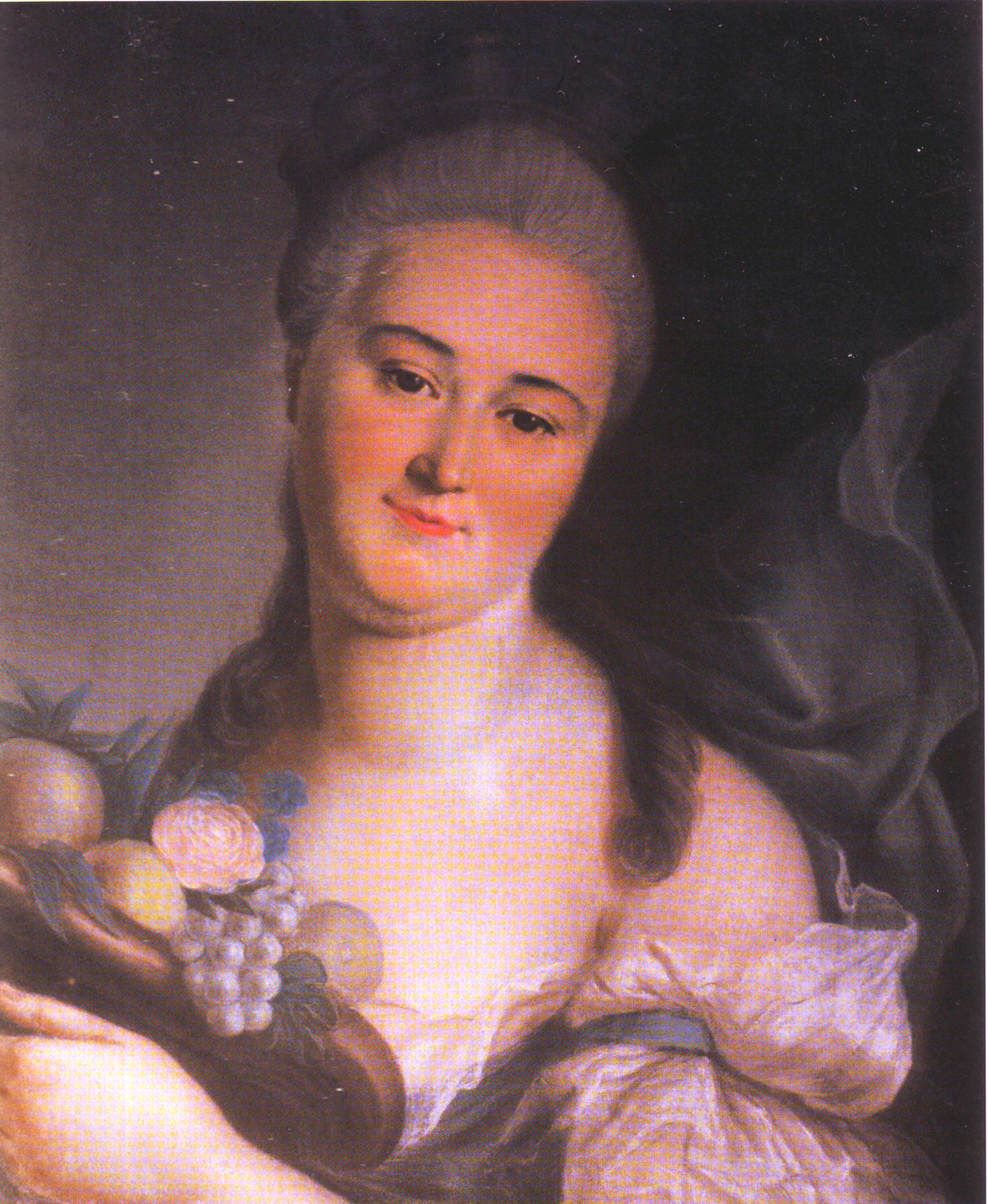 Жан де Самсуа. Портрет М.О. Закревской - "Земля". Марина Осиповна Закревская (1741-1800), жена Л. А. Нарышкина (1733-1799)